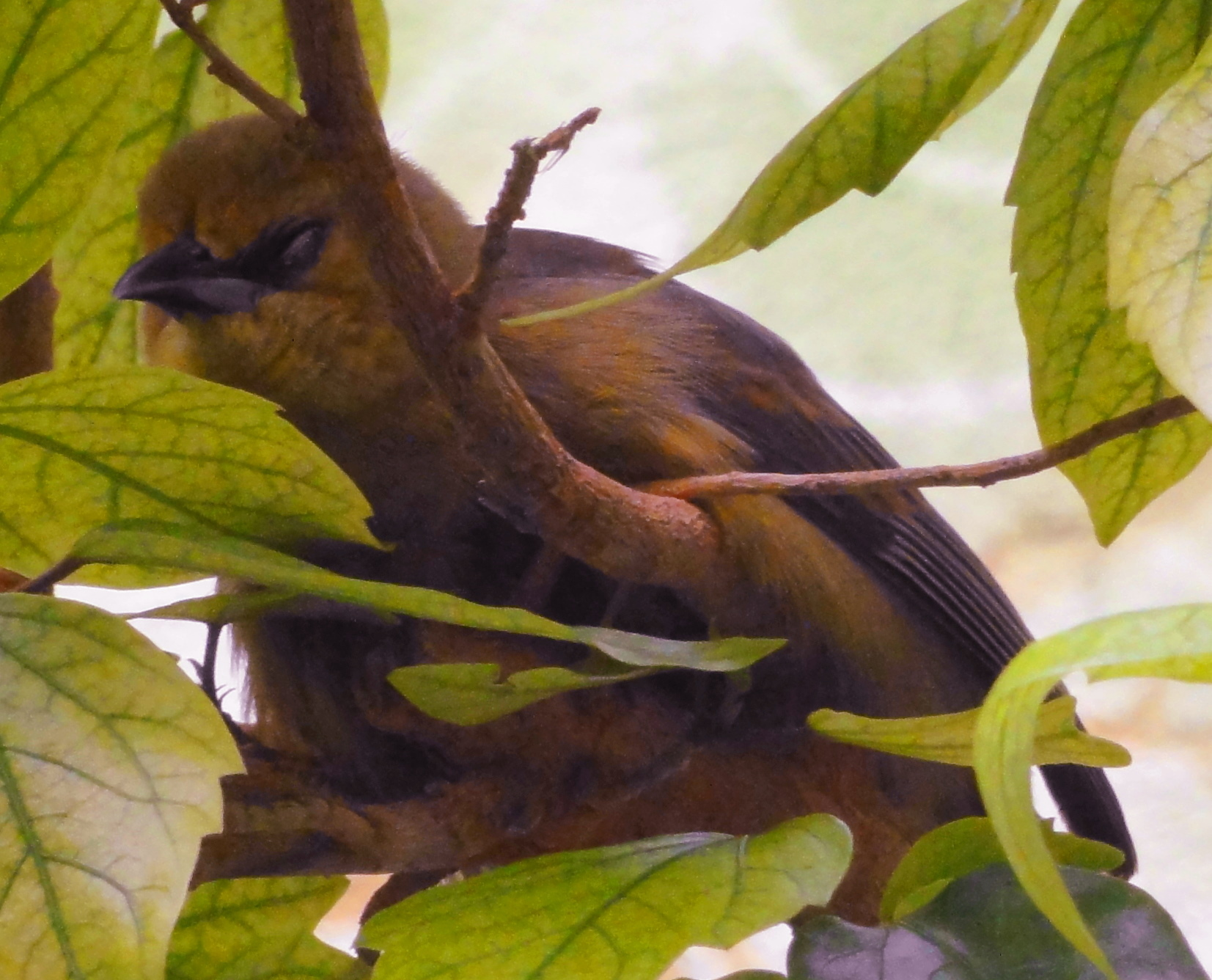 Icterus oberi, female